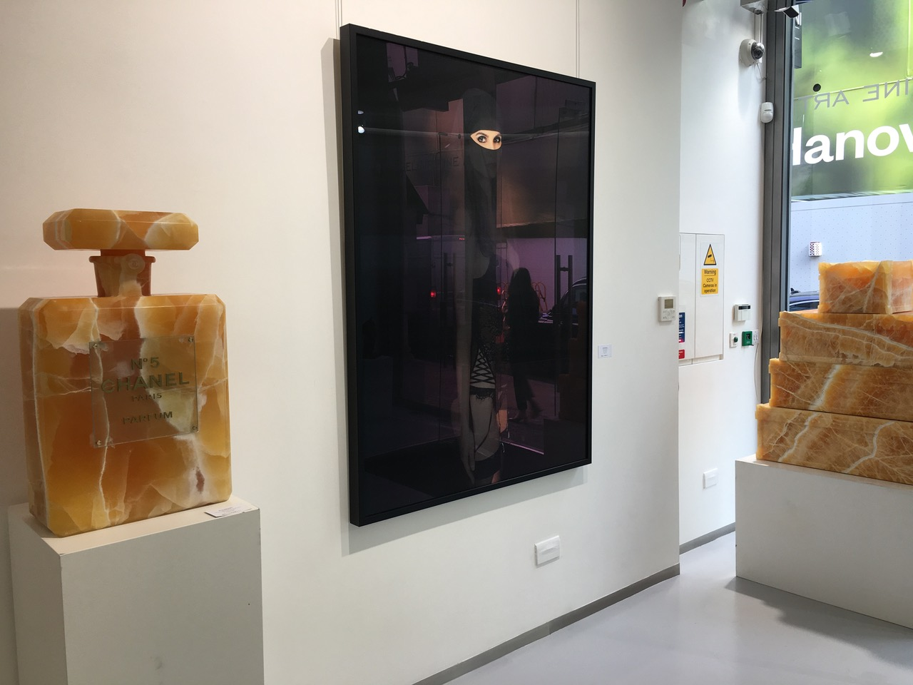 Photo Burqa Profil